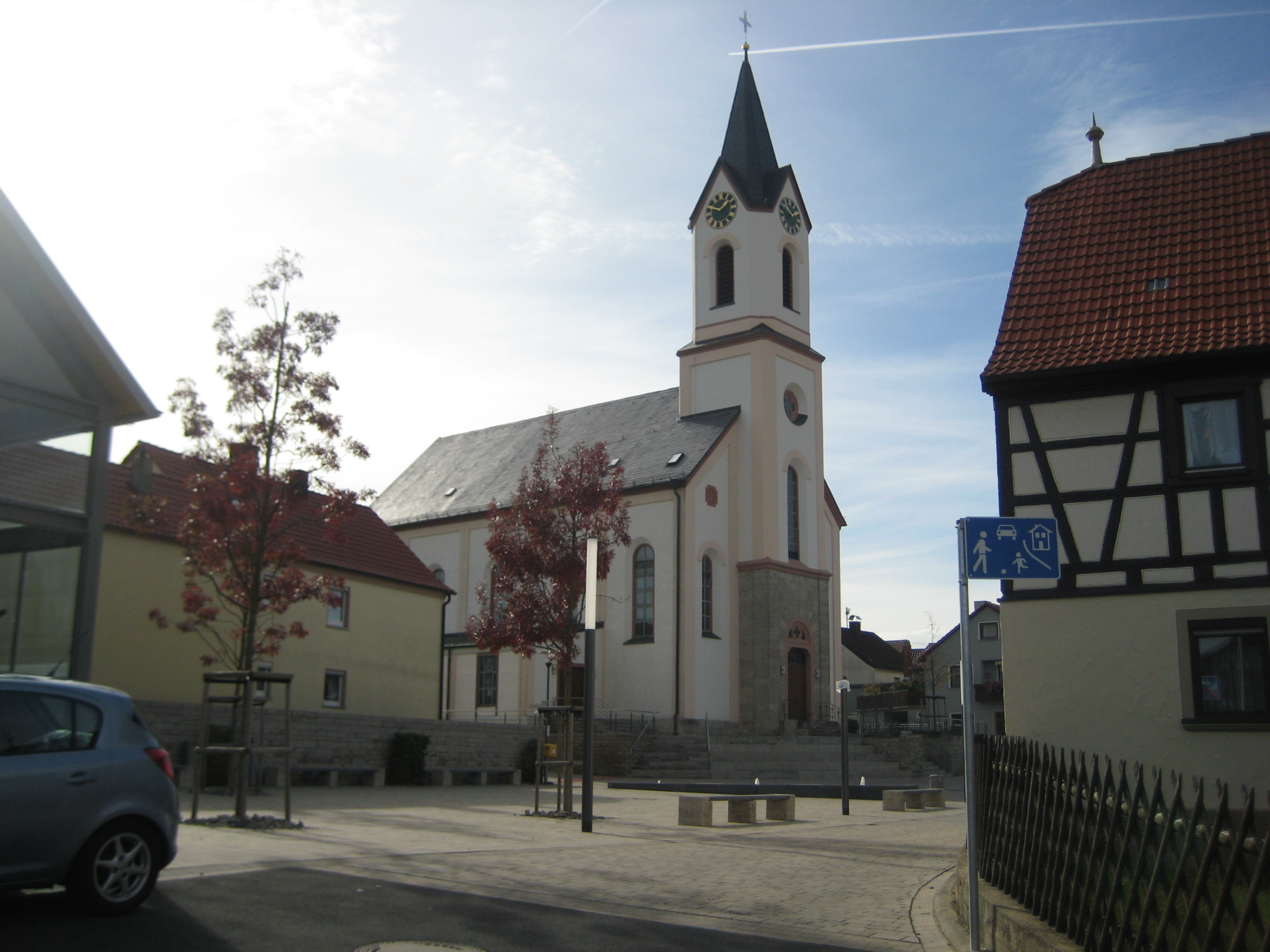 Katholische Pfarrkirche St. Bartholomäus mit Dorfplatz. Erbaut 1872.